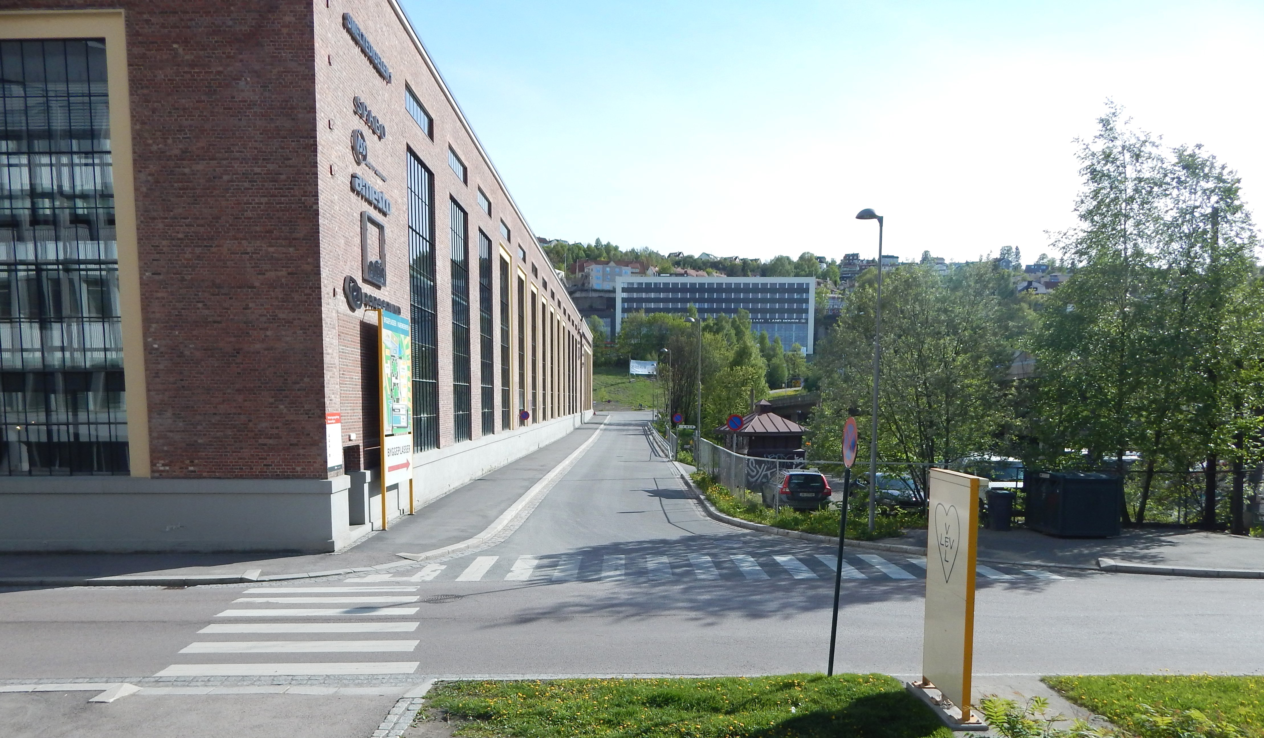 I dette krysset bak den gamle verkstedhallen møtes Freserveien (forfra), Turbinveien (fra venstre) og Kværnerveien (fra høyre).